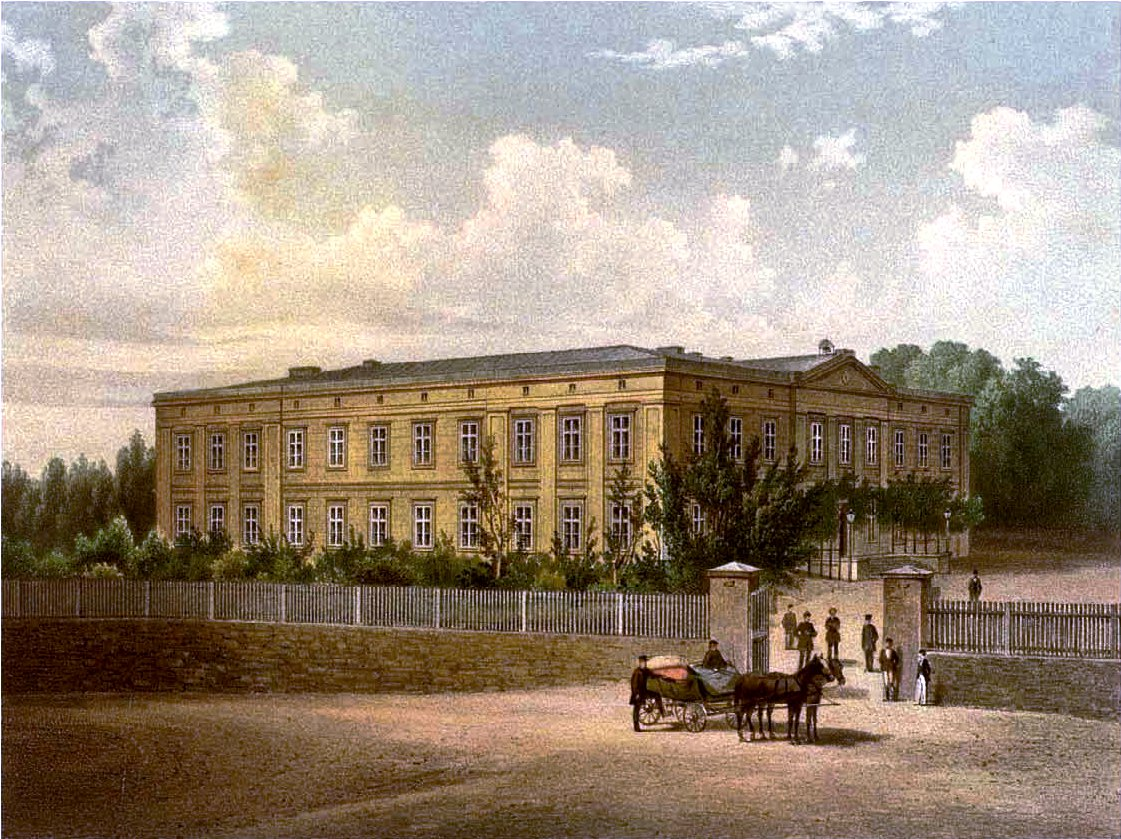 Schloss Schomberg-Orzegow, Kreis Beuthen, Provinz Schlesien